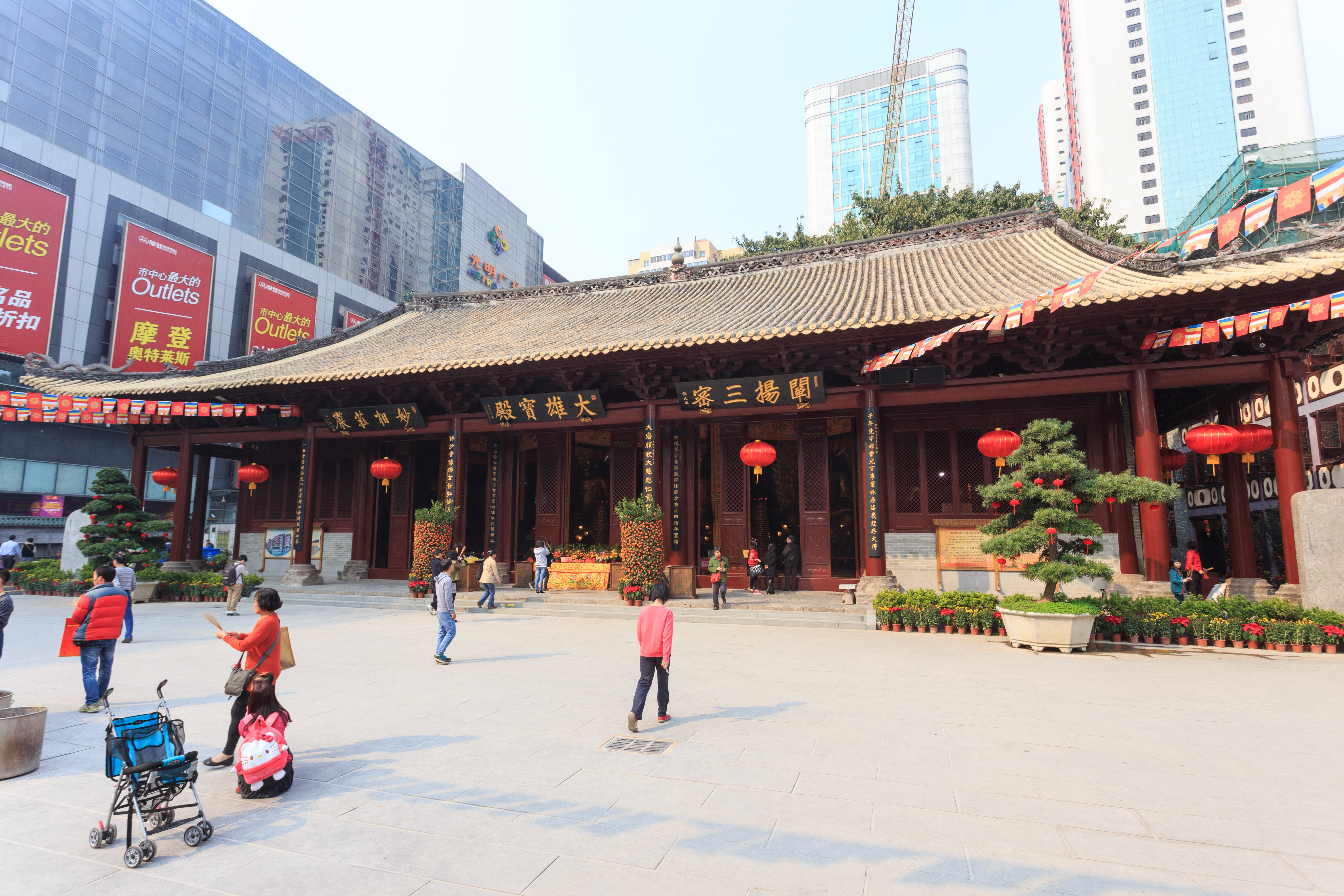 广州大佛寺 大殿